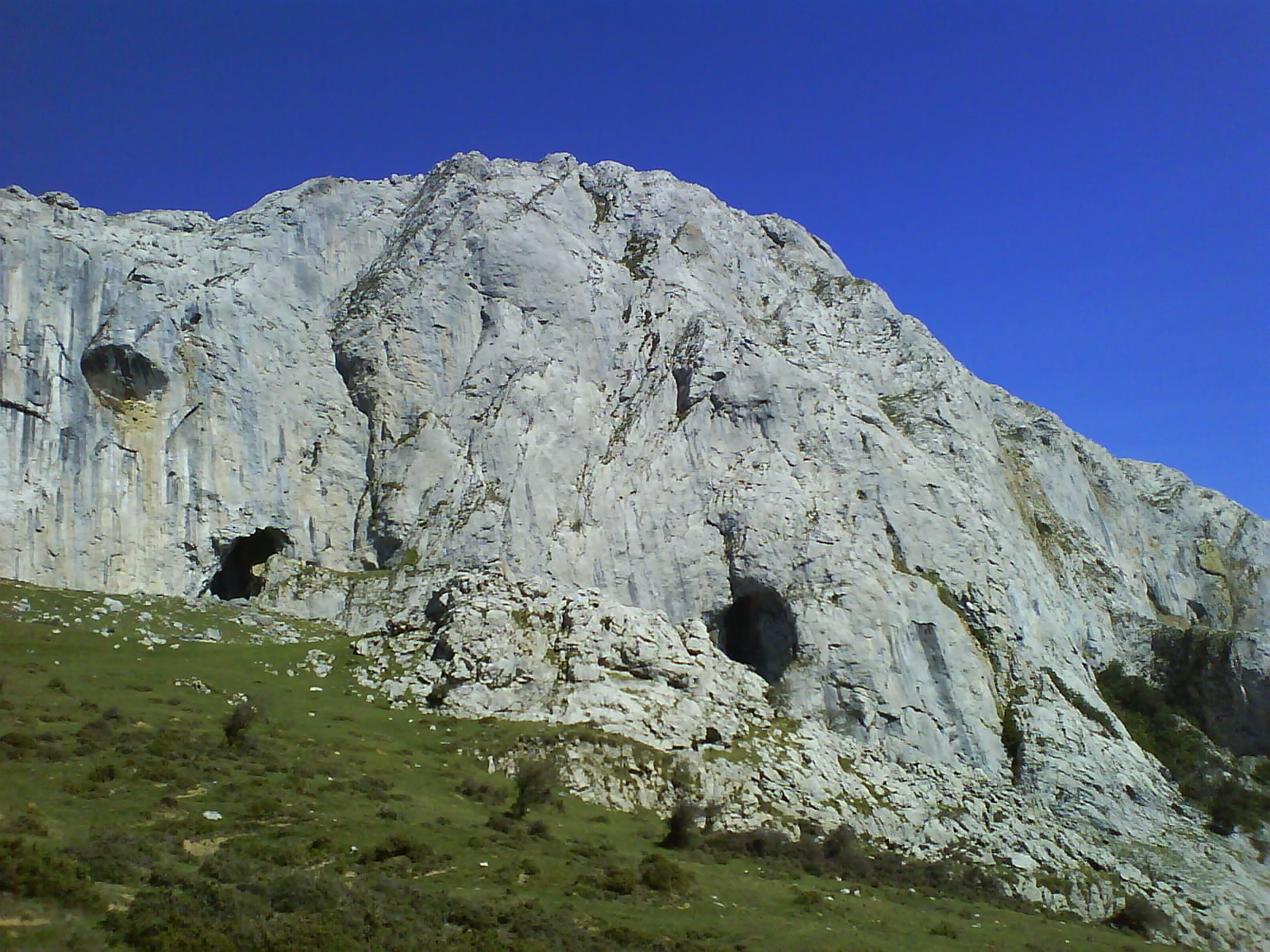 Vista del monte Mugarra desde Mugarrekolanda, Vizcaya, País Vasco, España